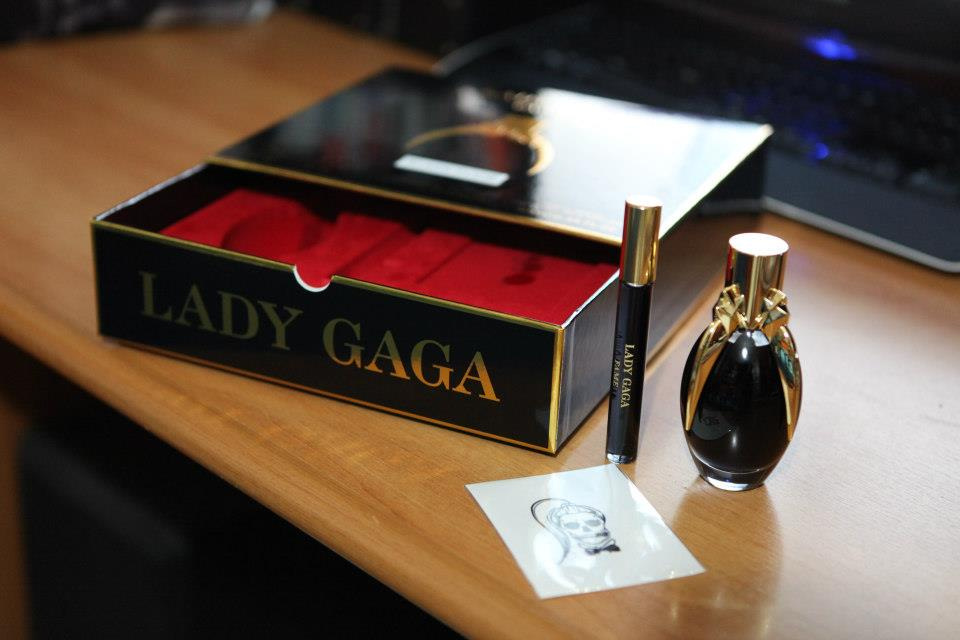 Lady Gaga "Fame" confezione regalo